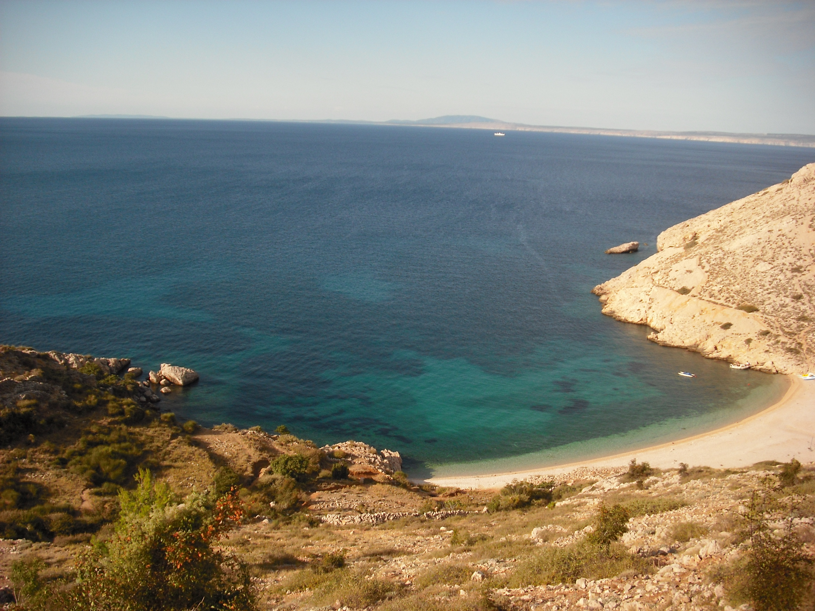 Caletta di Stara Baska, isola di Krk